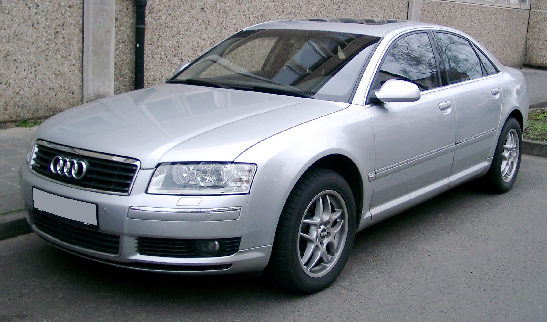 Audi A8